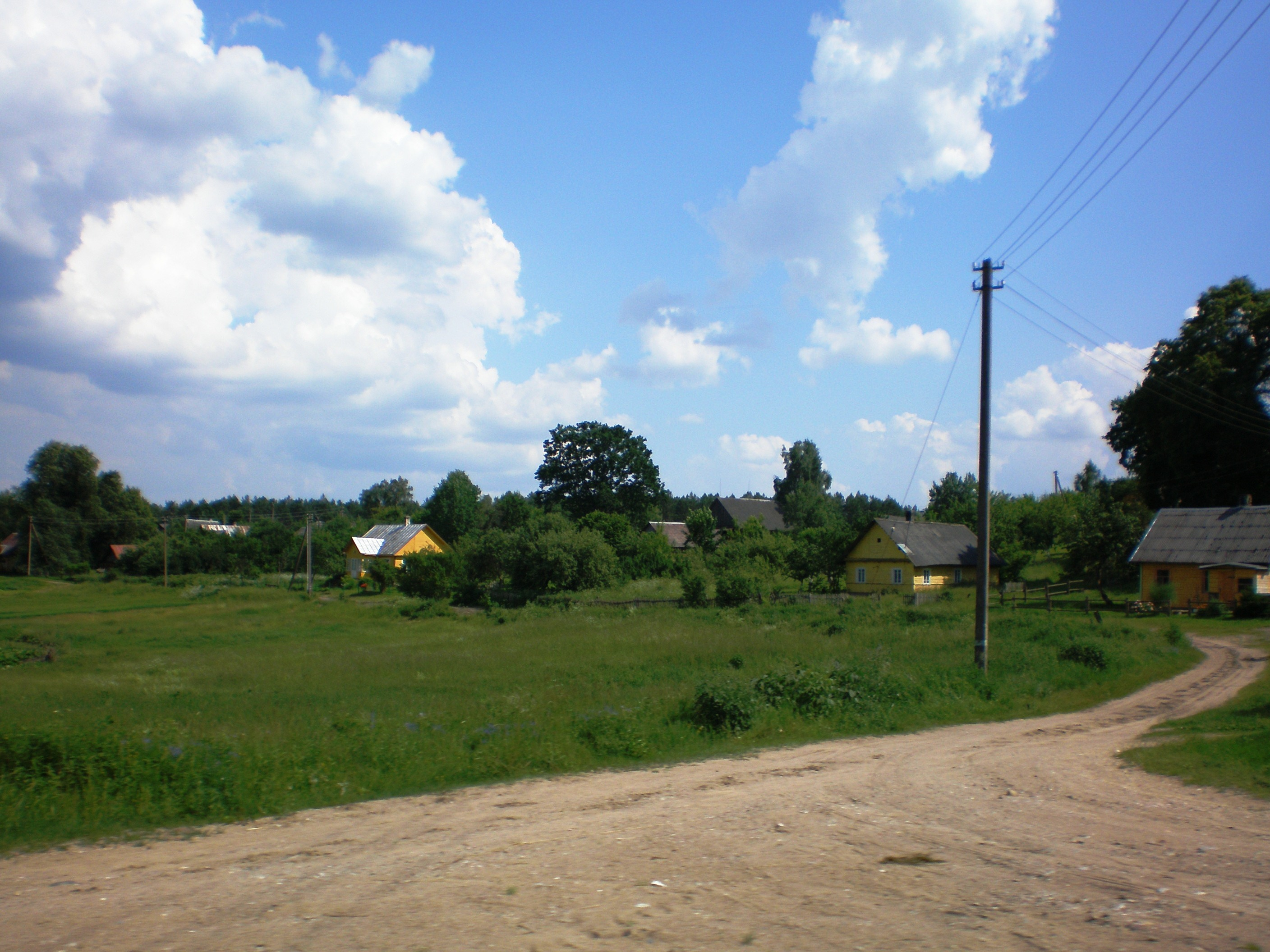 Margionys, Dzūkijos NP, Varėnos raj.